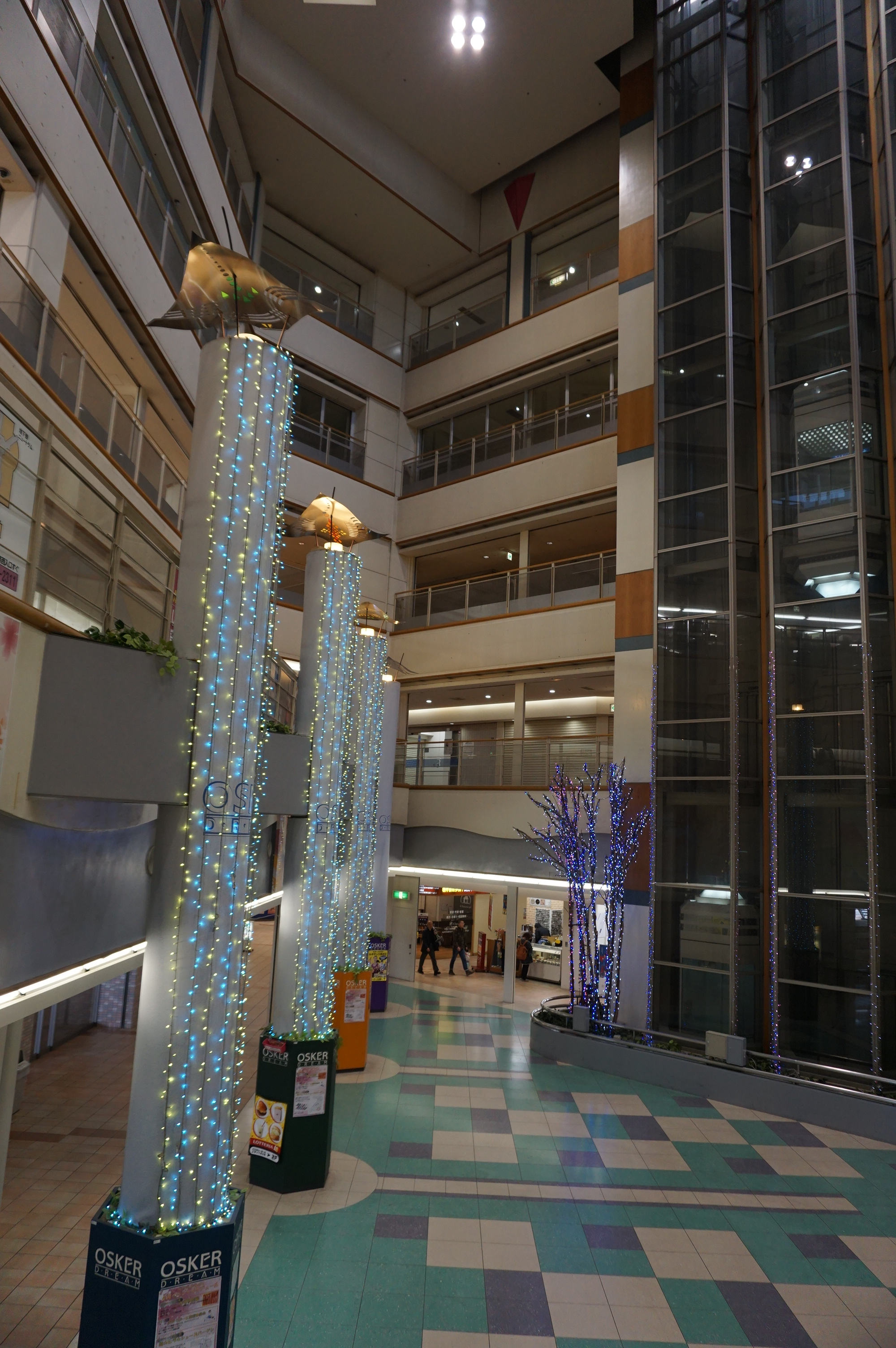 オスカードリームの吹き抜け部分